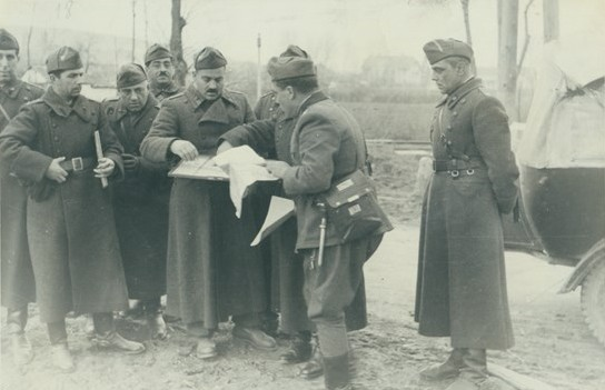 Военни от Шести артилерийски полк в бой при Дравасоболч.